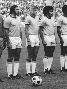 ADN-ZB-Mittelstädt-16.7.74-wen-München: X. Fußball-Weltmeisterschaft- Spiel um den dritten Platz Brasilien gegen VR Polen 0:1 am 6.7.74. Die Mannschaft Brasiliens vor Spielbeginn. Information added by Wikimedia users.World Cup 1974, Brazil-Poland, Munich. Centre: Francisco Marinho Chagas.